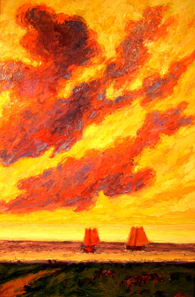 olieverf